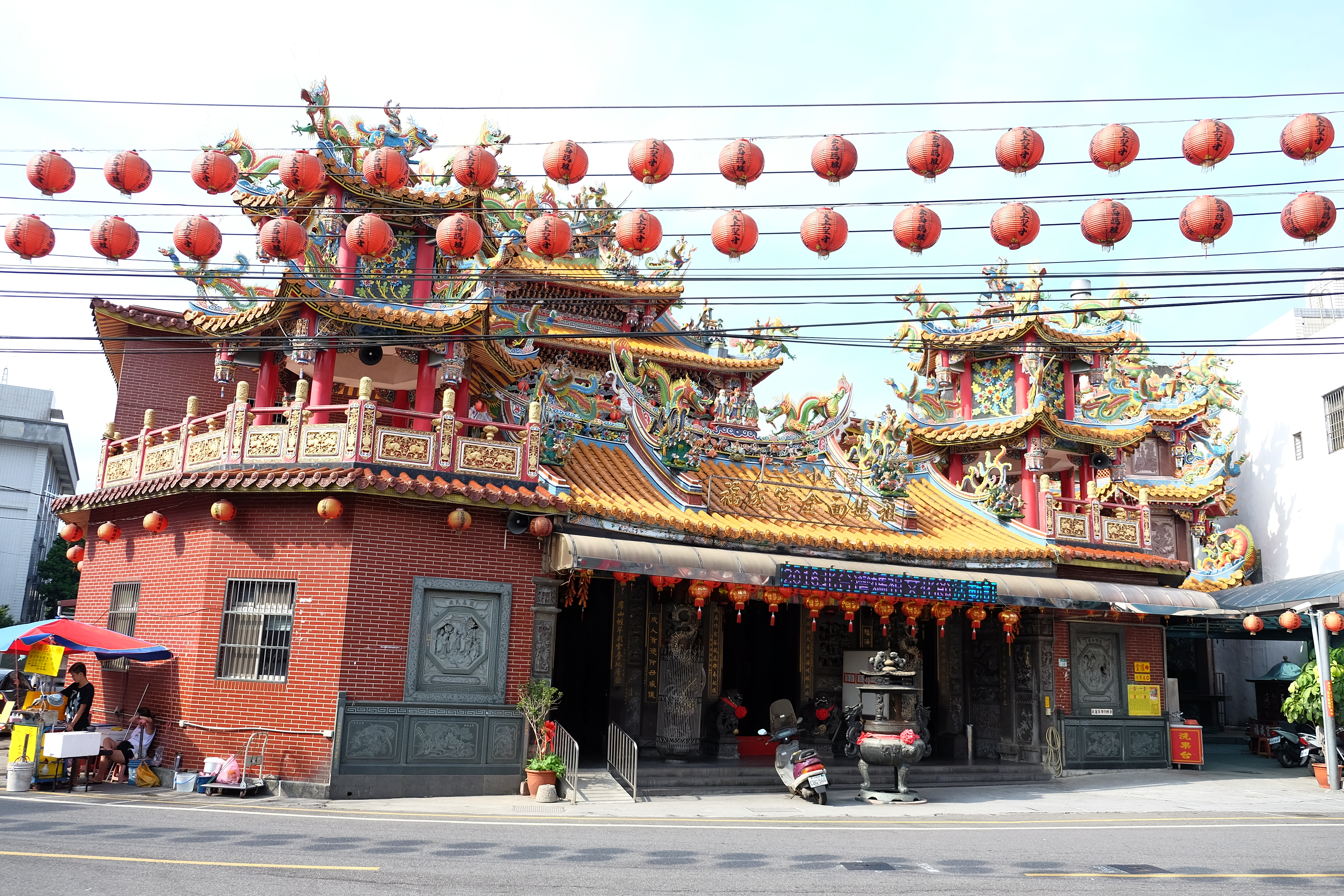 三芝福成宮